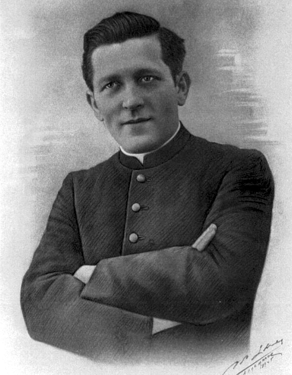 Le RP Louis Favre (1910-1944), Juste parmi les Nations